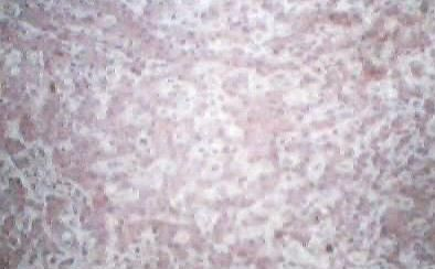 This image was copied from pt. The original description was: Células de fígado normal. by Angeloleithold/1975. Descrição Vista das células de um fígado saudável. Fonte Angeloleithold, acervo particular/1975. Licença